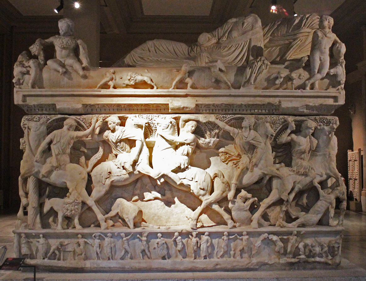 Istanbul, Museo archeologico, Sarcofago di Sidamara (inv.1179 T; catalogo di Mendel n.112), da Konya, seconda metà del III secolo, lato anteriore